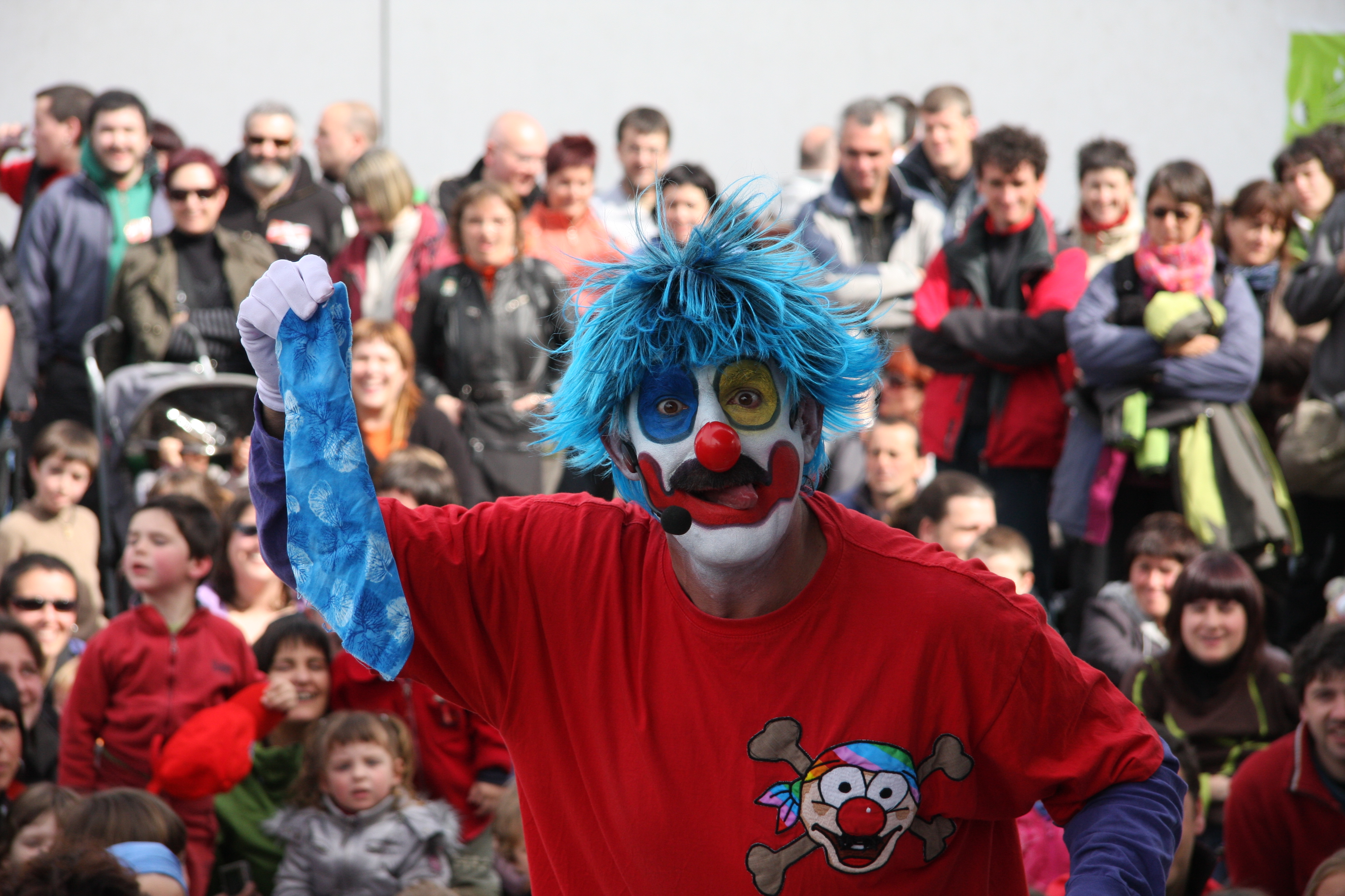 El payaso Porrotx (de Pirritx eta Porrotx) en la celebracion del Aberri Eguna (Día de la Patria, celebrado el Domingo de Resurrección) de los partidos independentistas vascos en Irún y Hendaya en 2009.